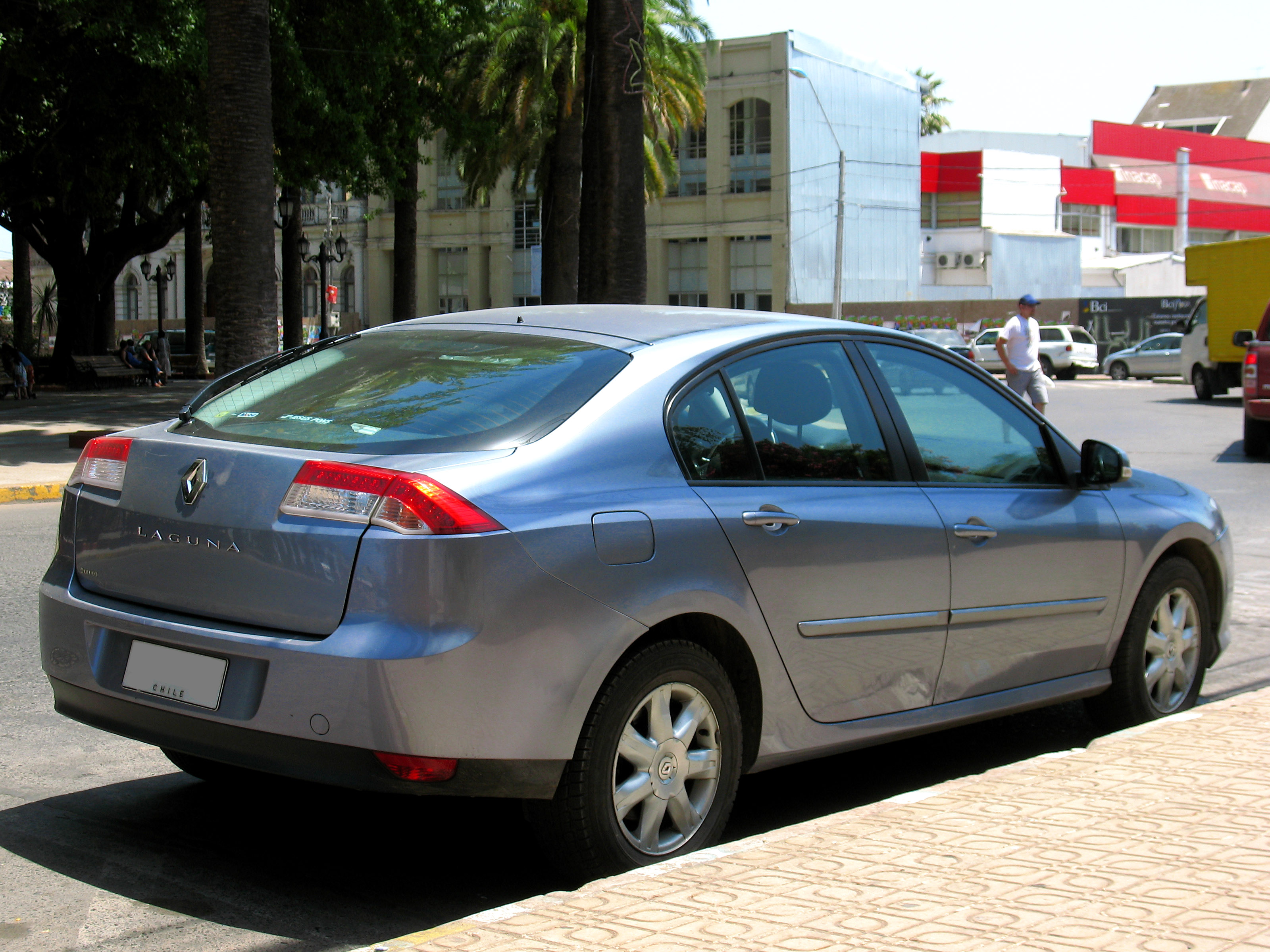 Renault Laguna 2.0 Expression 2009